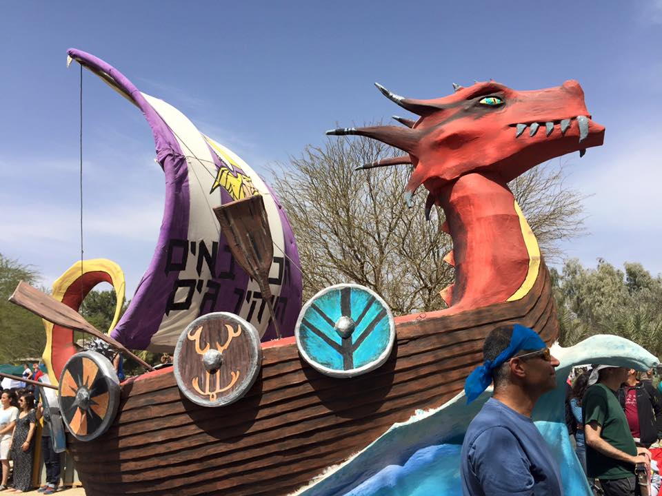 עדלאידע שדה בוקר